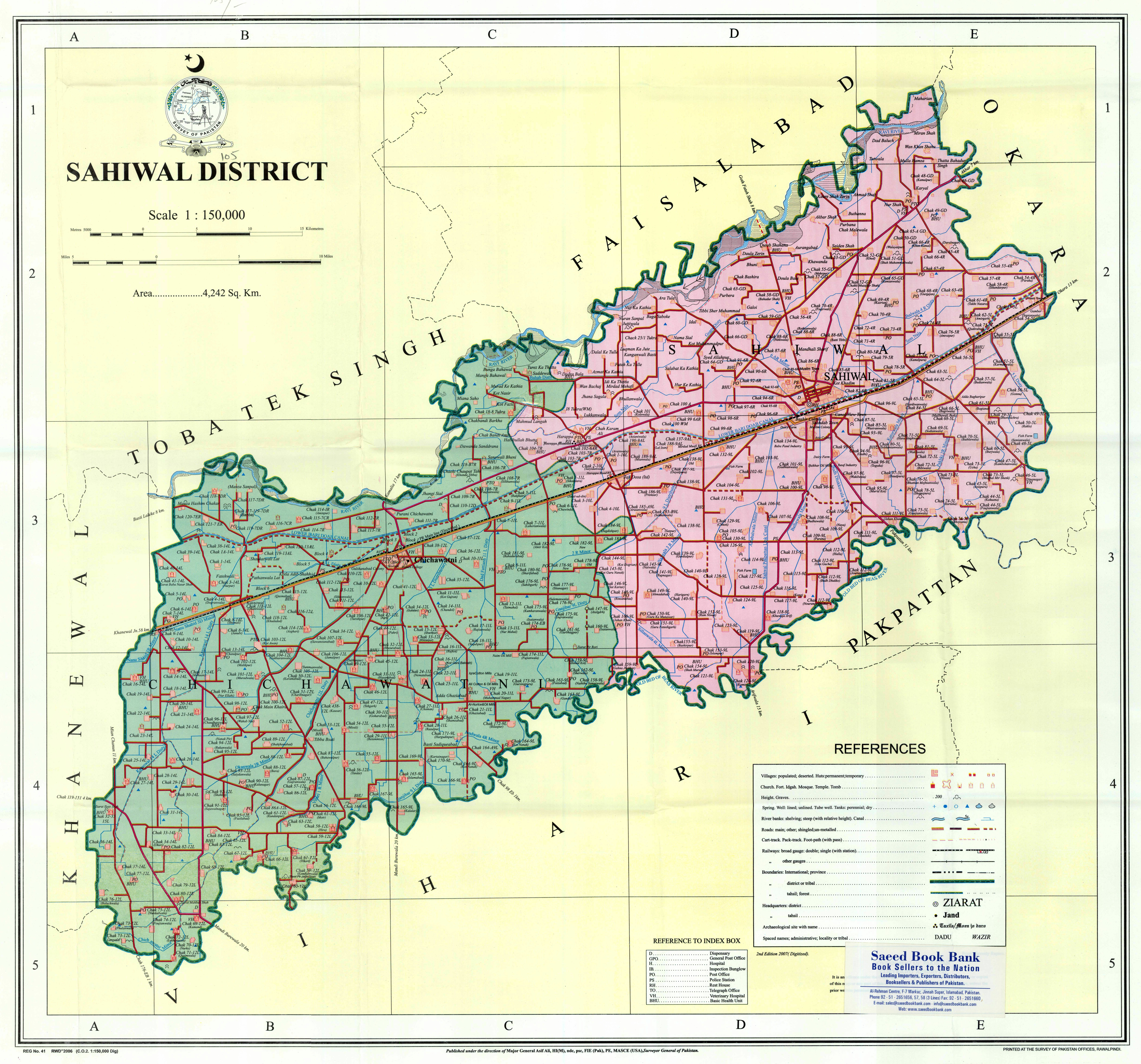 پنجابی: ضلع ساہیوال دے پنڈاں دا نقشہ